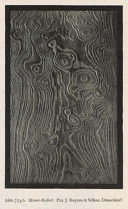 Maser-Relief nach dem Xylektypom-Verfahren.